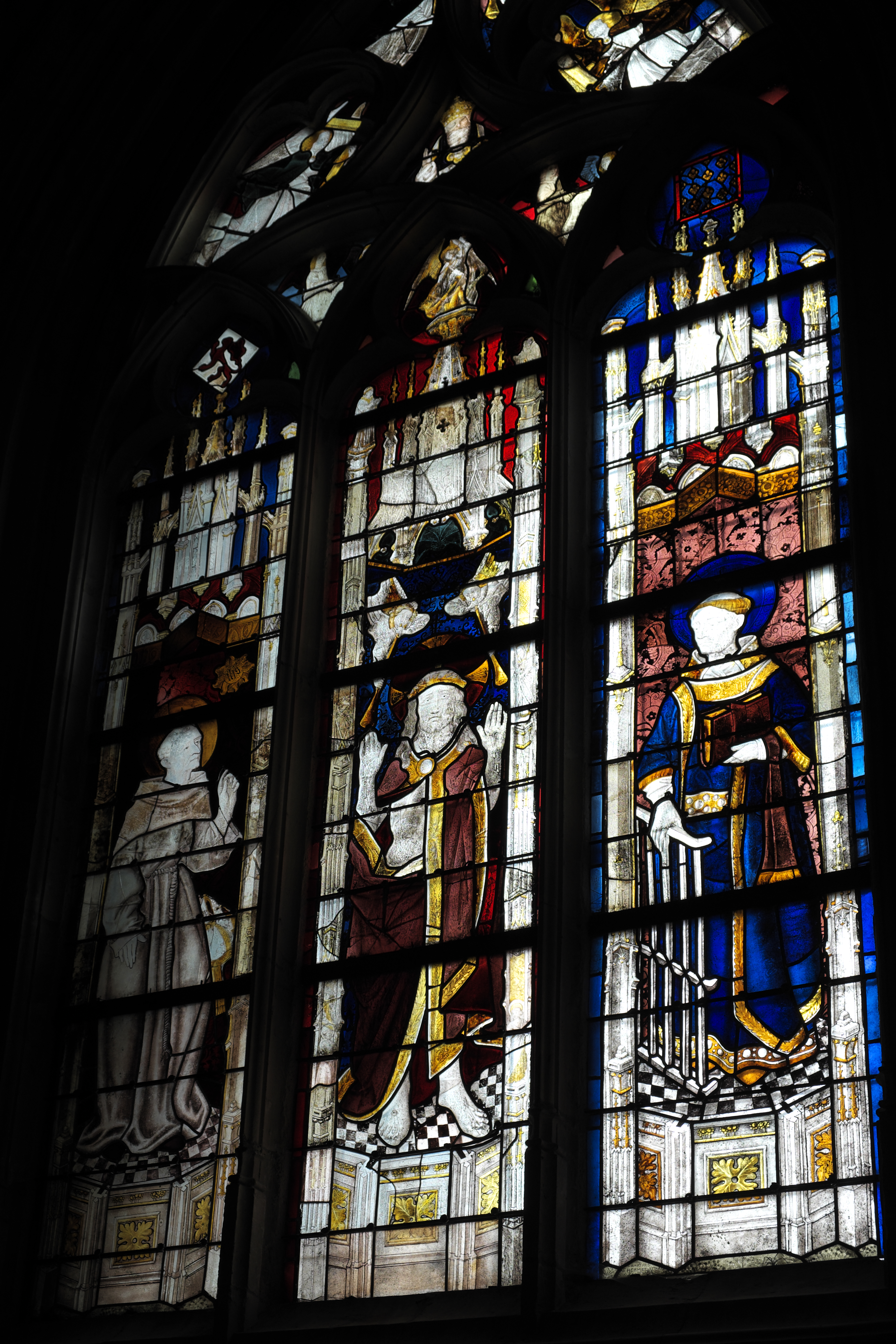 Katholische Pfarrkirche Notre-Dame-des-Marais in La Ferté-Bernard im Département Sarthe (Pays de la LoirePays de la Loire/Frankreich), Bleiglasfenster mit Fragmenten aus dem 15./16. Jahrhundert, 1931 restauriert und ergänzt; Darstellung: Hl. Bernhard (links); Christus, der seine Wunden zeigt (Mitte); hl. Laurentius (rechts)